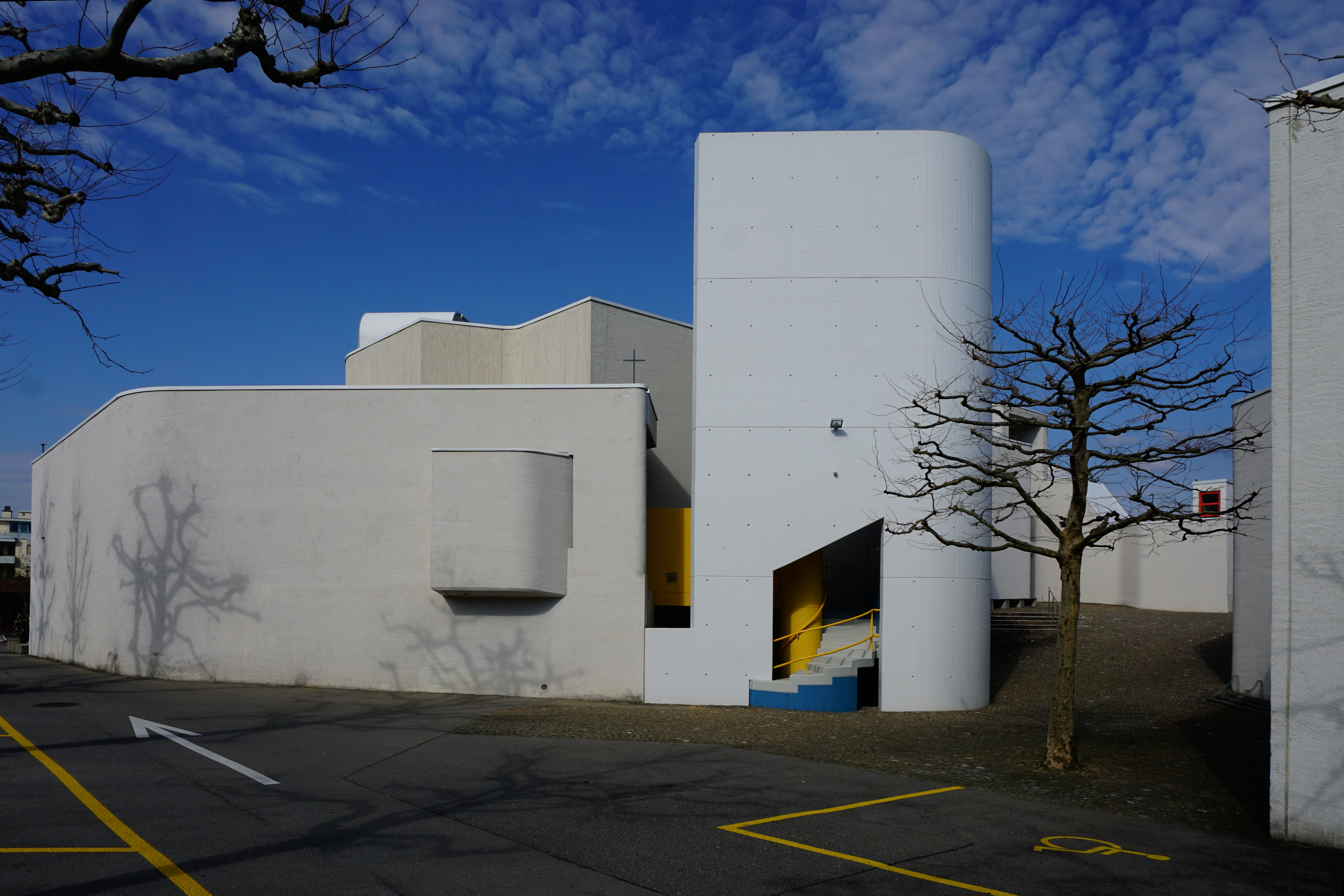 Römisch Katholische Pfarrkirche St. Martin in Thun. Aussen